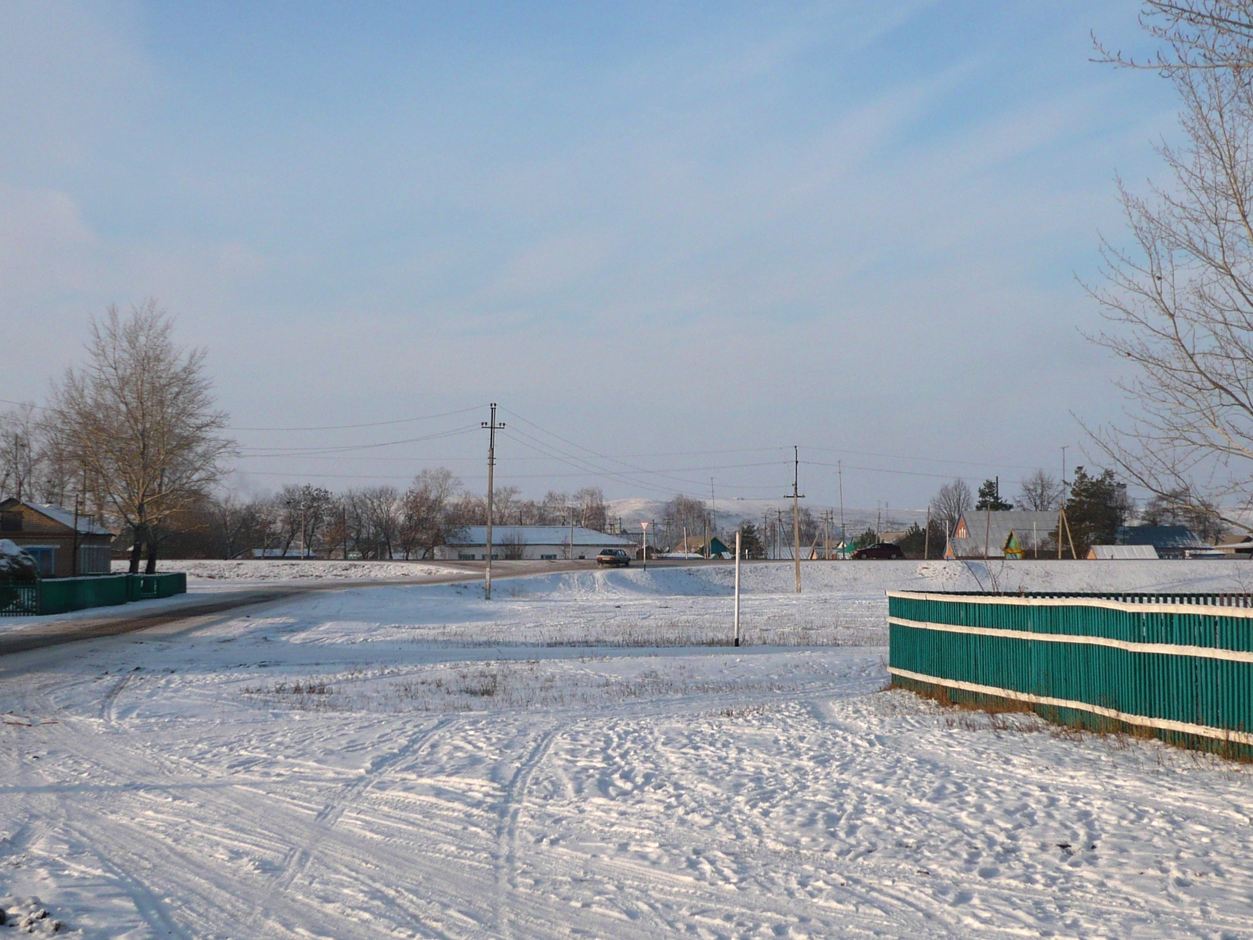 Новомурапталово / Novomouraptalovo